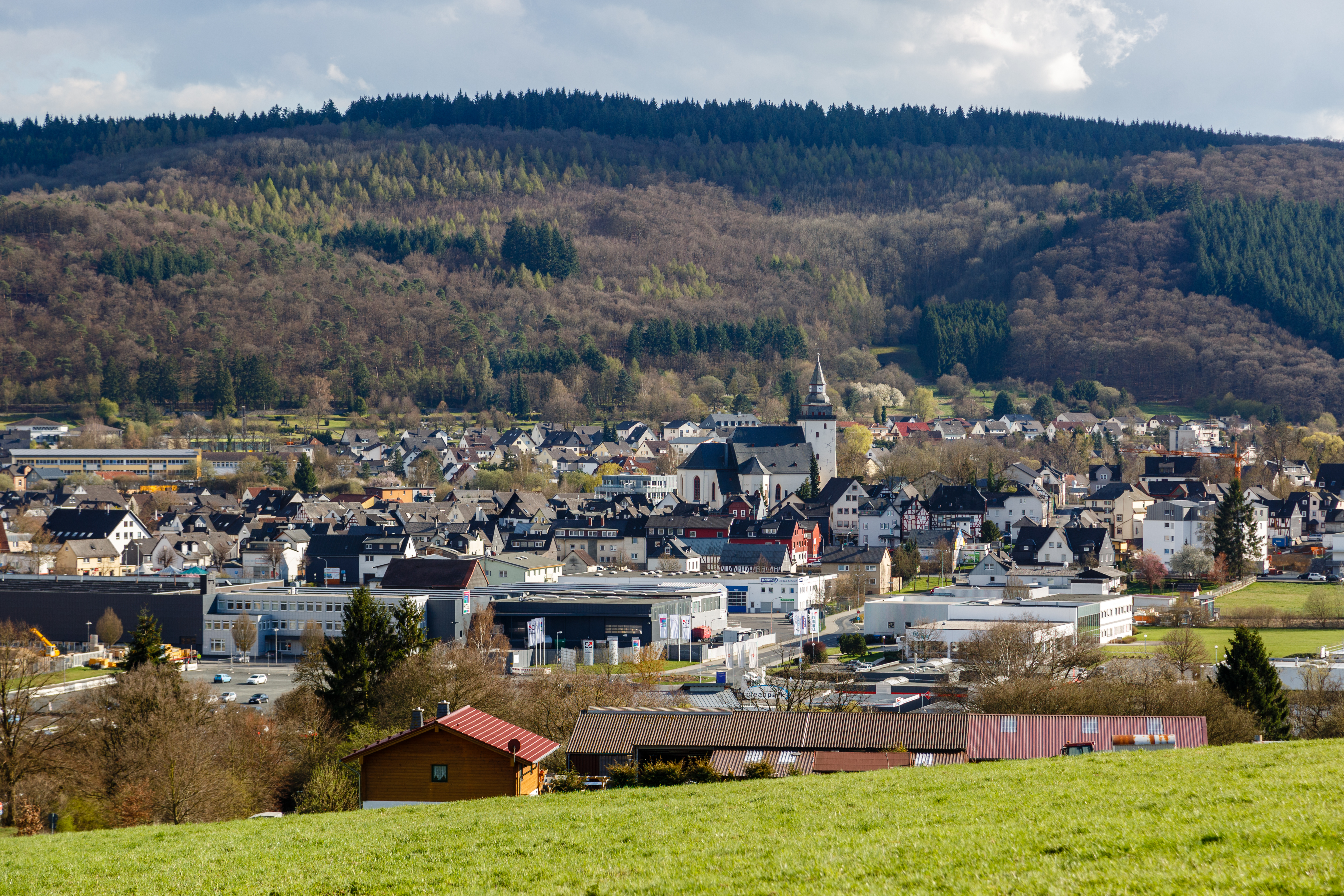 Haiger, Ansicht aus Richtung Nordost